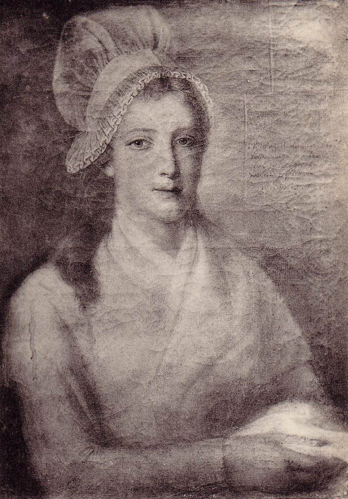 Charlotte Corday, pastel de J-J Hauer. Portrait effectué en 1793, après l'arrestation de la jeune femme.